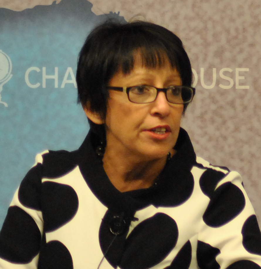 Baroness Kishwer Falkner